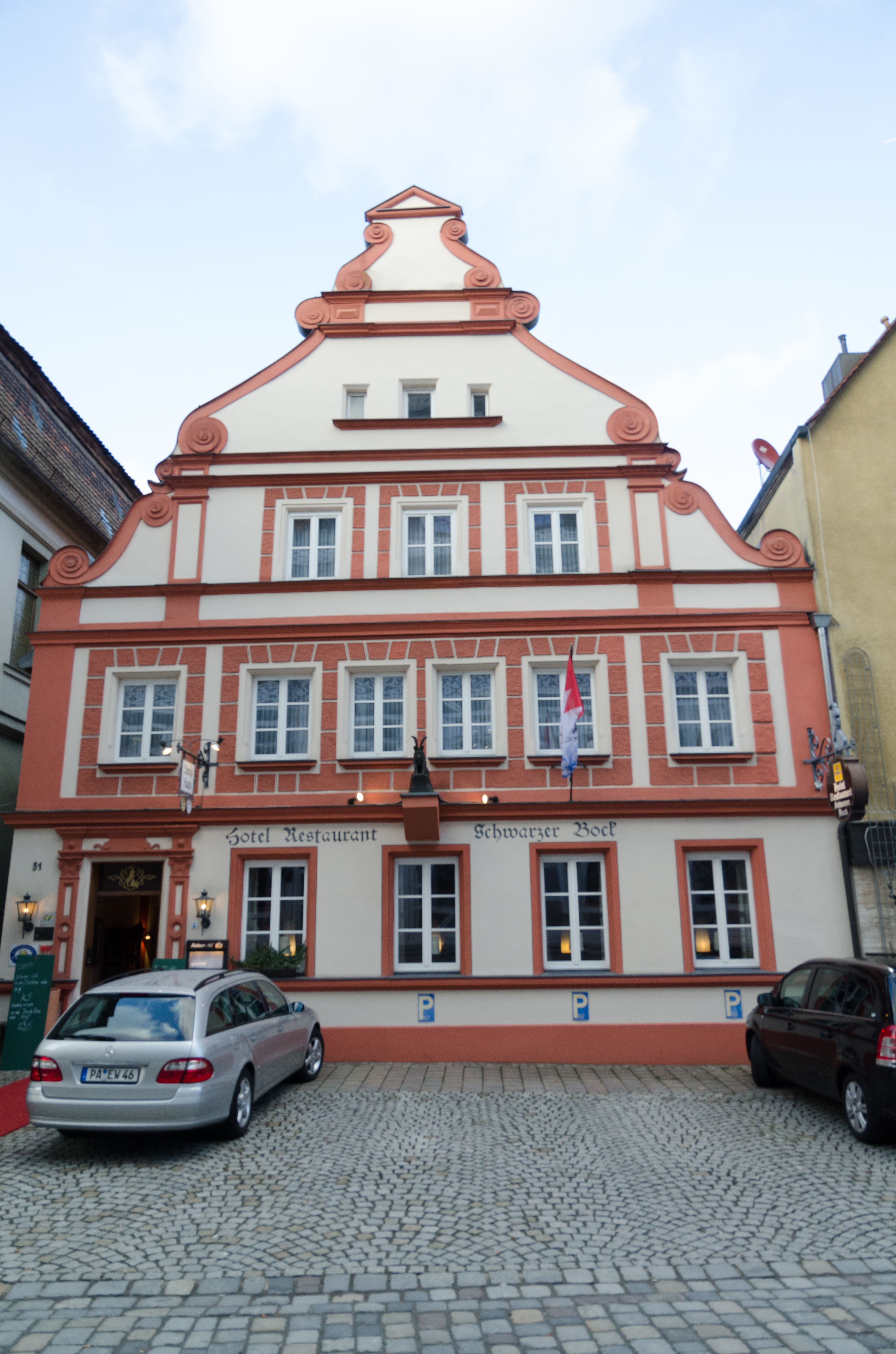 Ansbach, Pfarrstraße 31